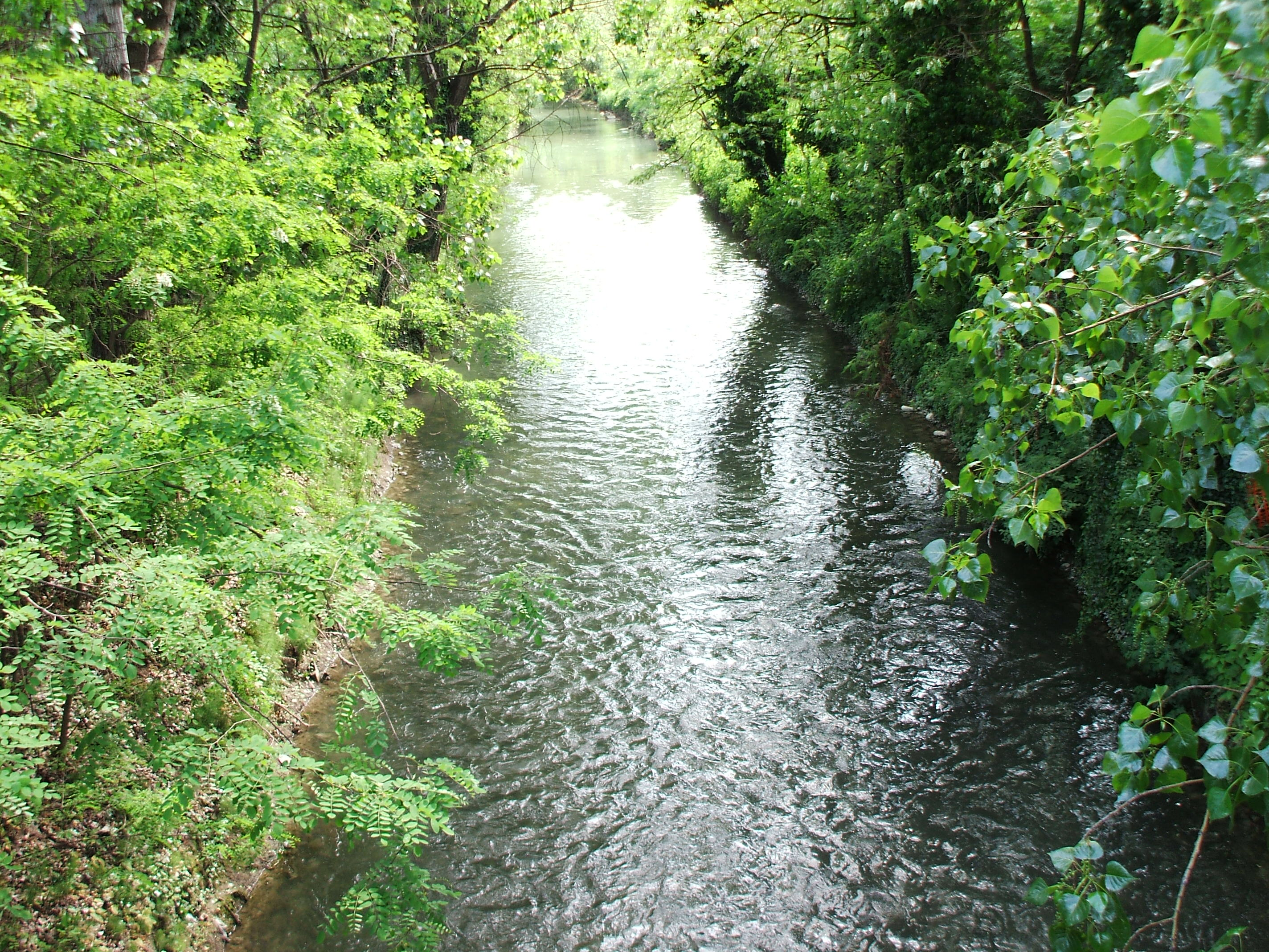 Canale Navile, as seen from Villa Angeletti Park, Bologna